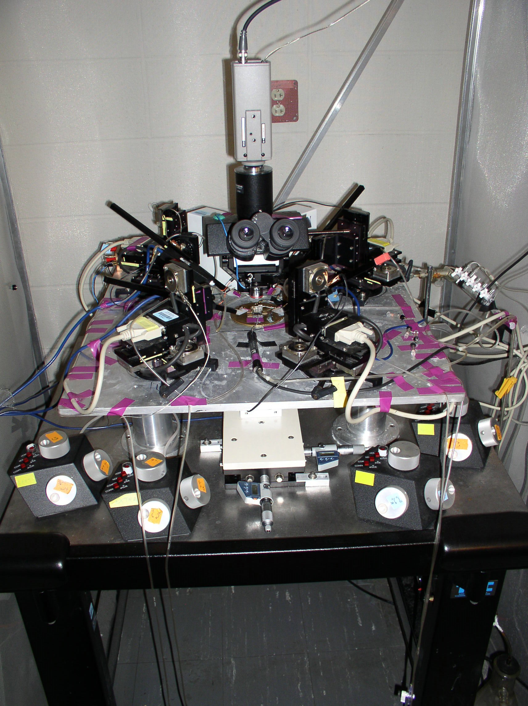 A 4 electrode slice electrophysiological rig.